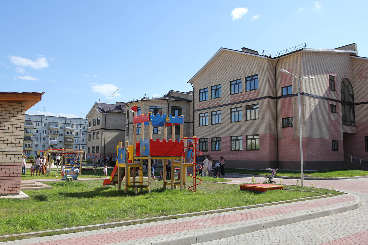 Детский сад №112 "Золотая рыбка", ул. Фрязиновская, 2015 год